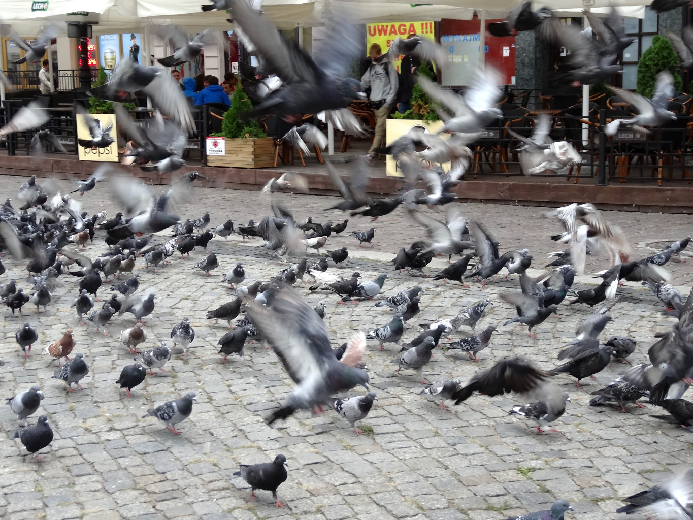 Stary Rynek w Bydgoszczy